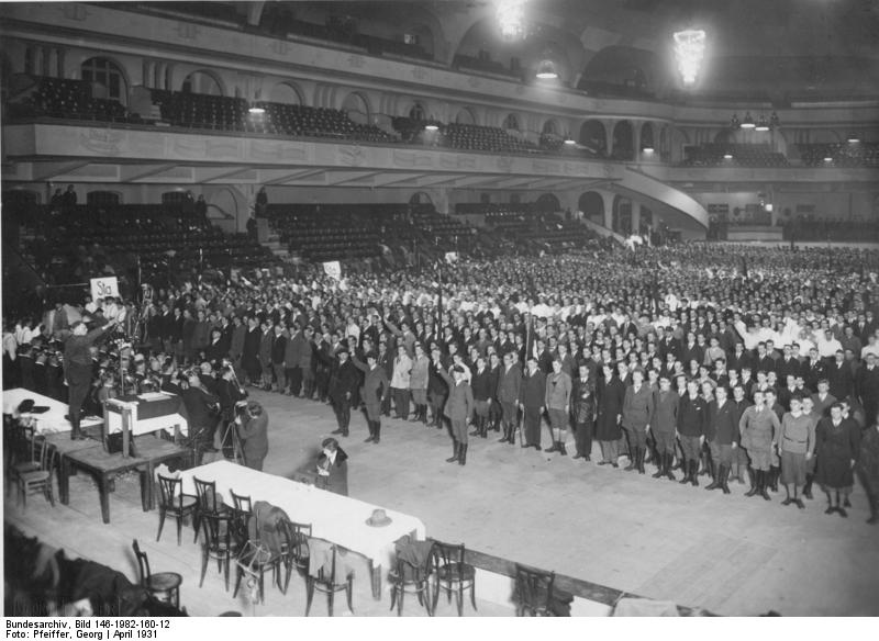 Generalappell der Berliner SA im Sportpalast im April 1931. Redner: Leutnant Heines